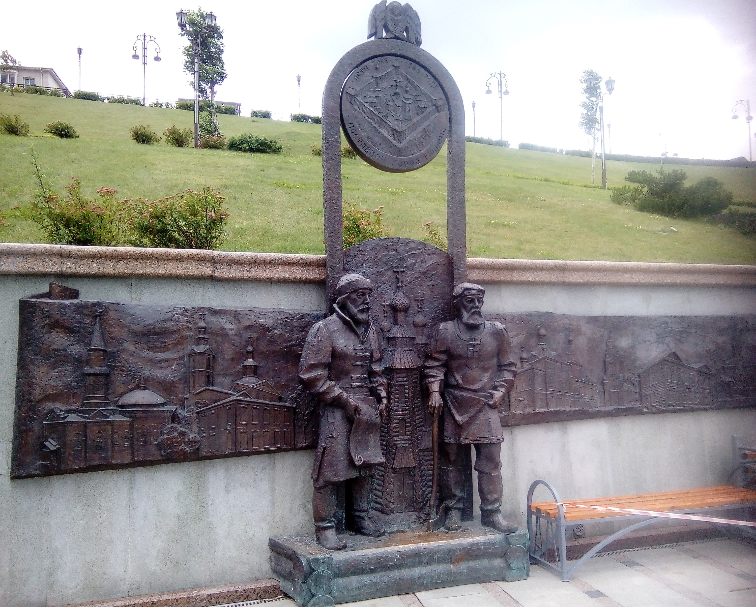 Мной был сделан фотоснимок скульптуры с набережной Туры, на которой изображены основатели Тюмени — воеводы Мясной и Сукин.